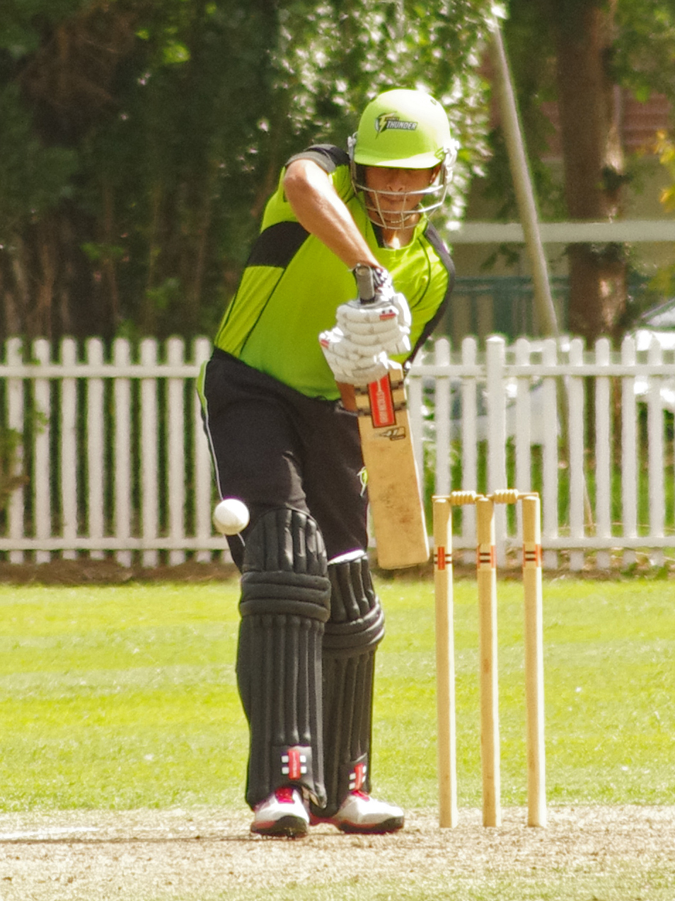 Usman khawaja